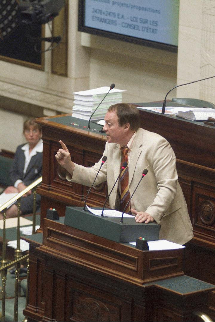 Filip De Man in the Belgian Parlement